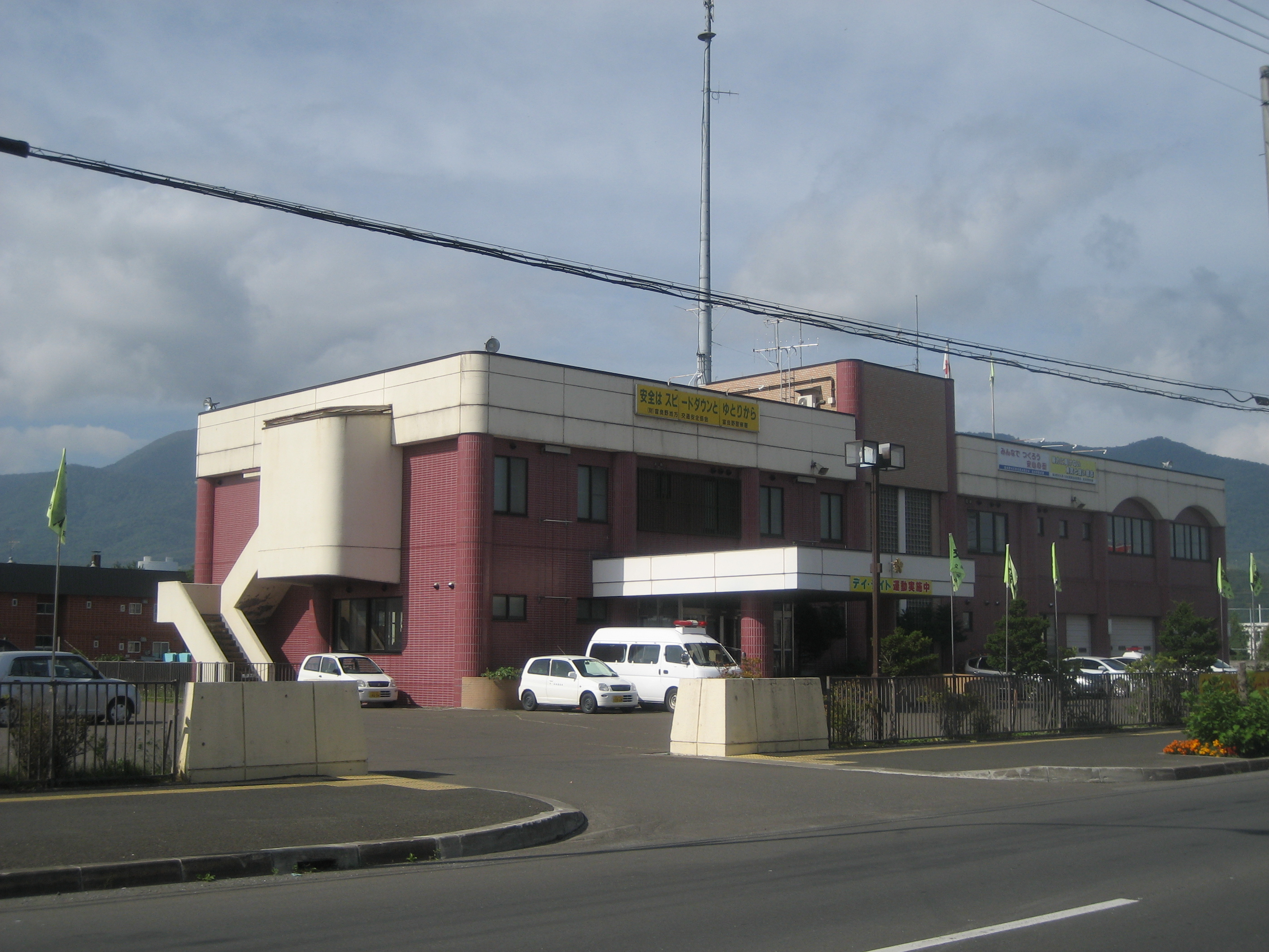 北海道警察旭川方面富良野警察署庁舎